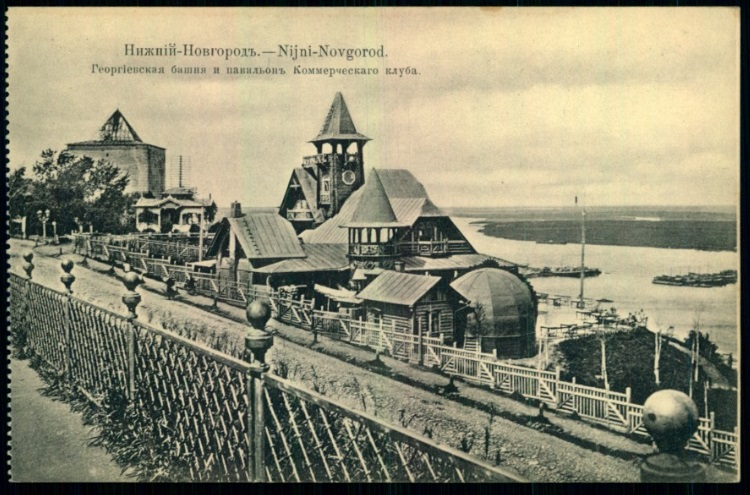 Георгиевская башня Нижегородского кремля и павильон Коммерческого клуба (1904-1917)